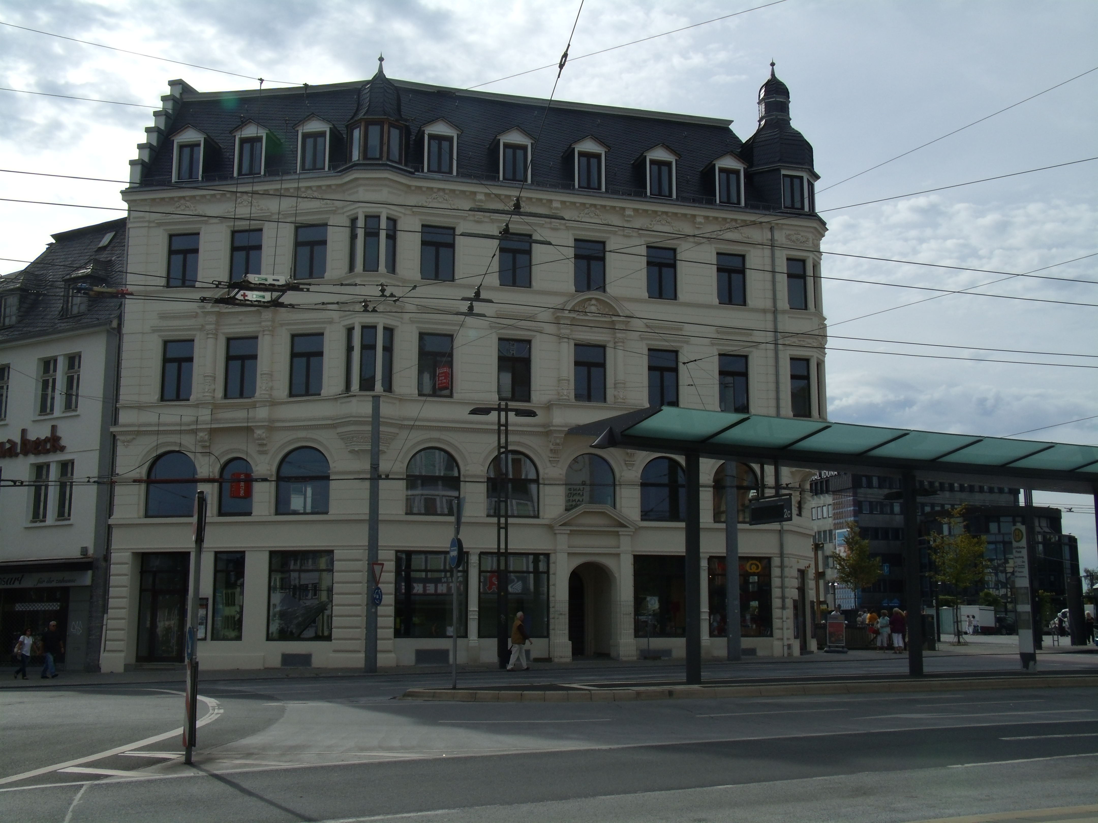 Am Neumarkt 1, "Tückmantel" Ecke Kölner Straße 73–77